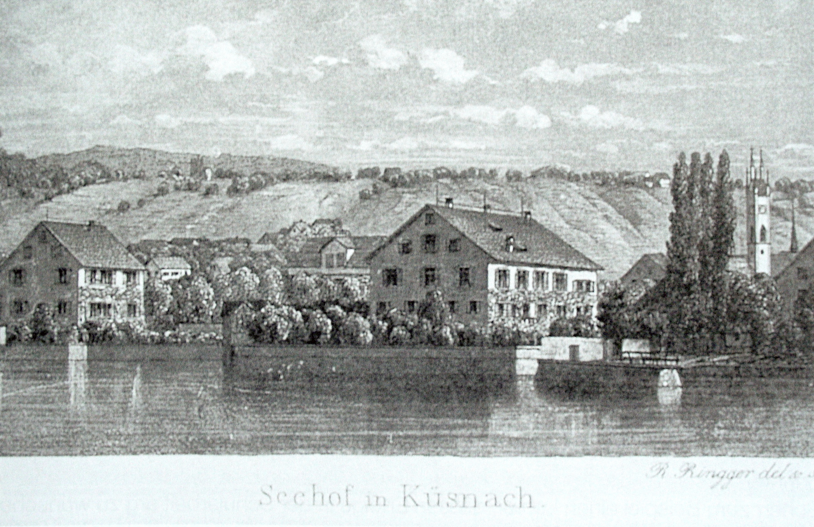 Der «Seehof» in Küsnacht, Zeichnung von Rudolf Ringger, um 1830/35